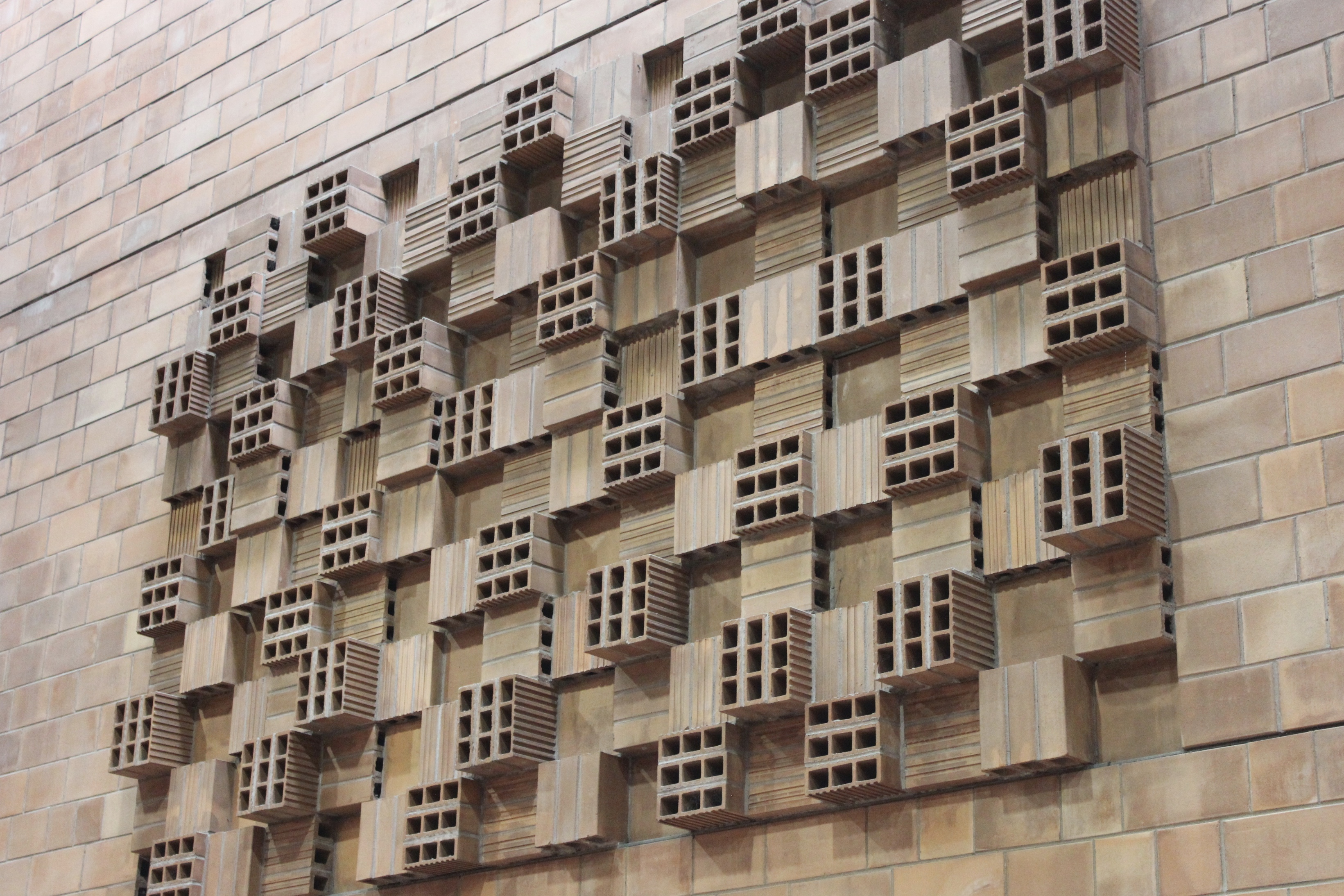 Murale d'Aurelio Sandonato de la station Du College.